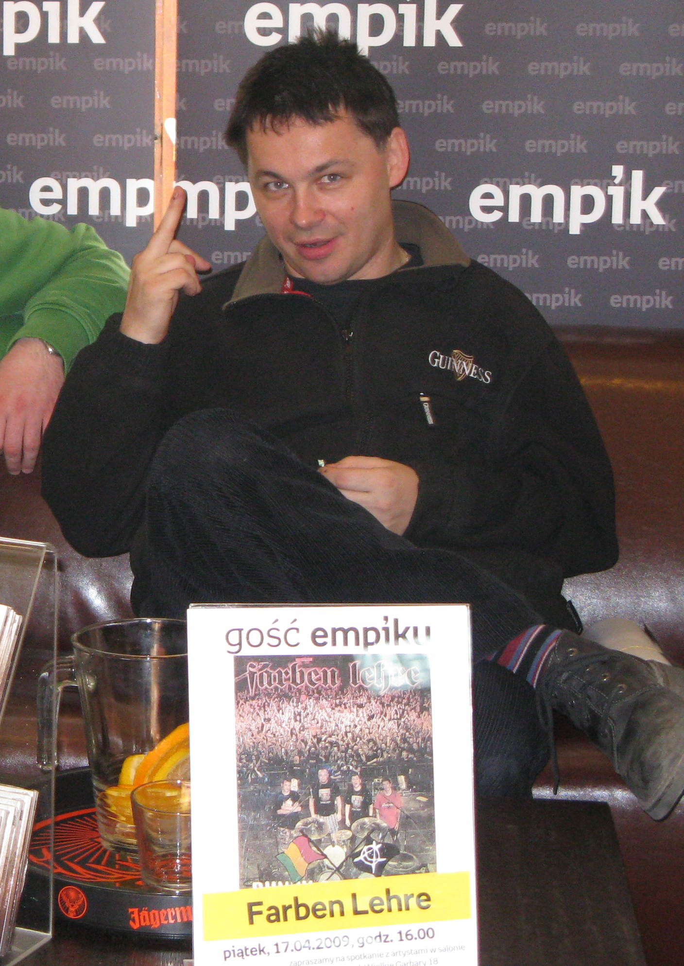 Wojciech Wojda z zespołu Farben Lehre